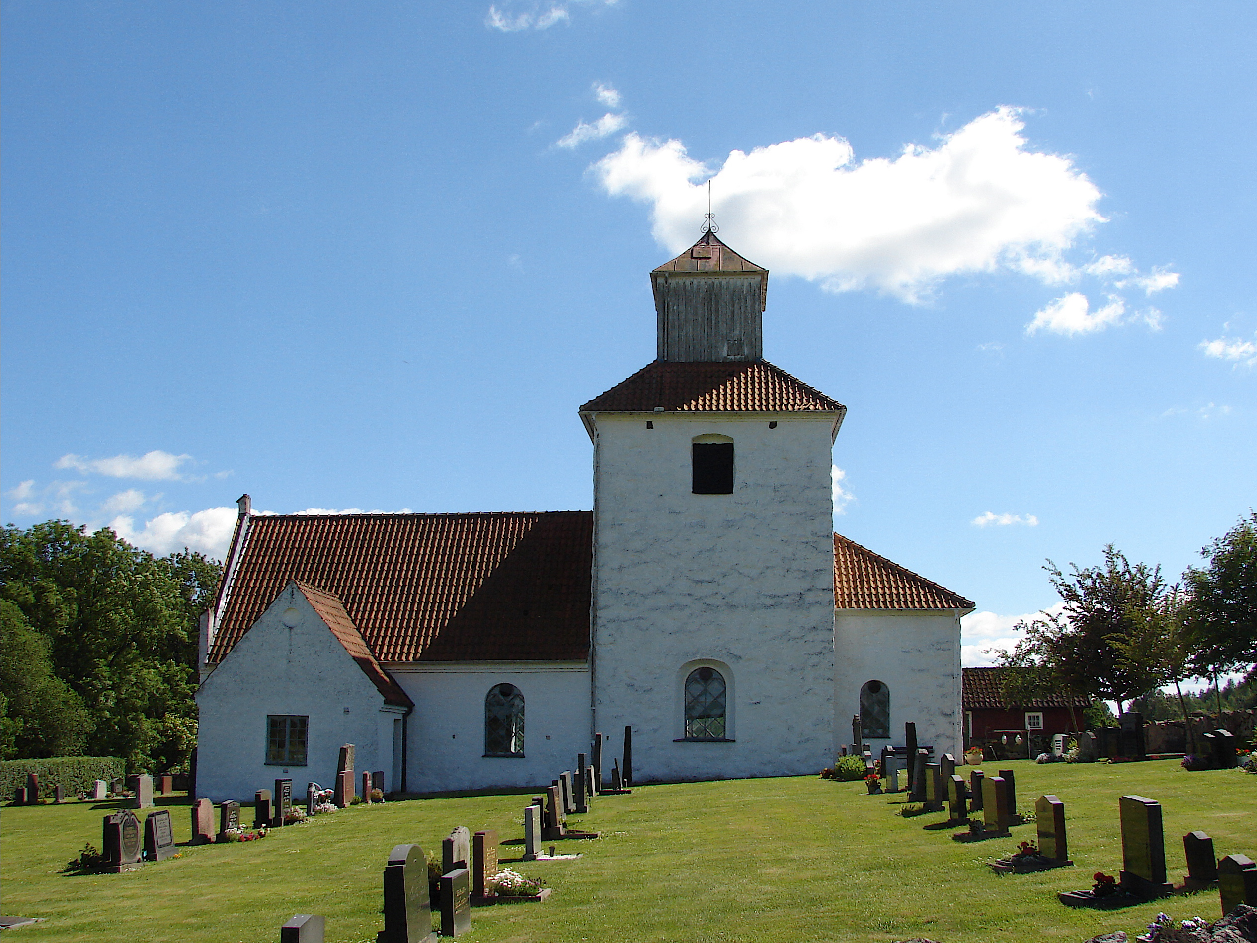 Sankt Ursula Kirke, Ivö, Ifø